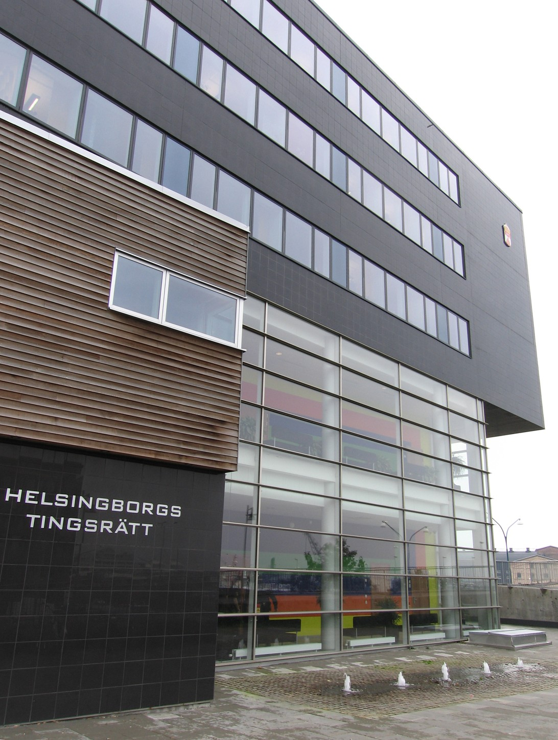 Helsingborgs tingsrätt, byggd 2005/2006.